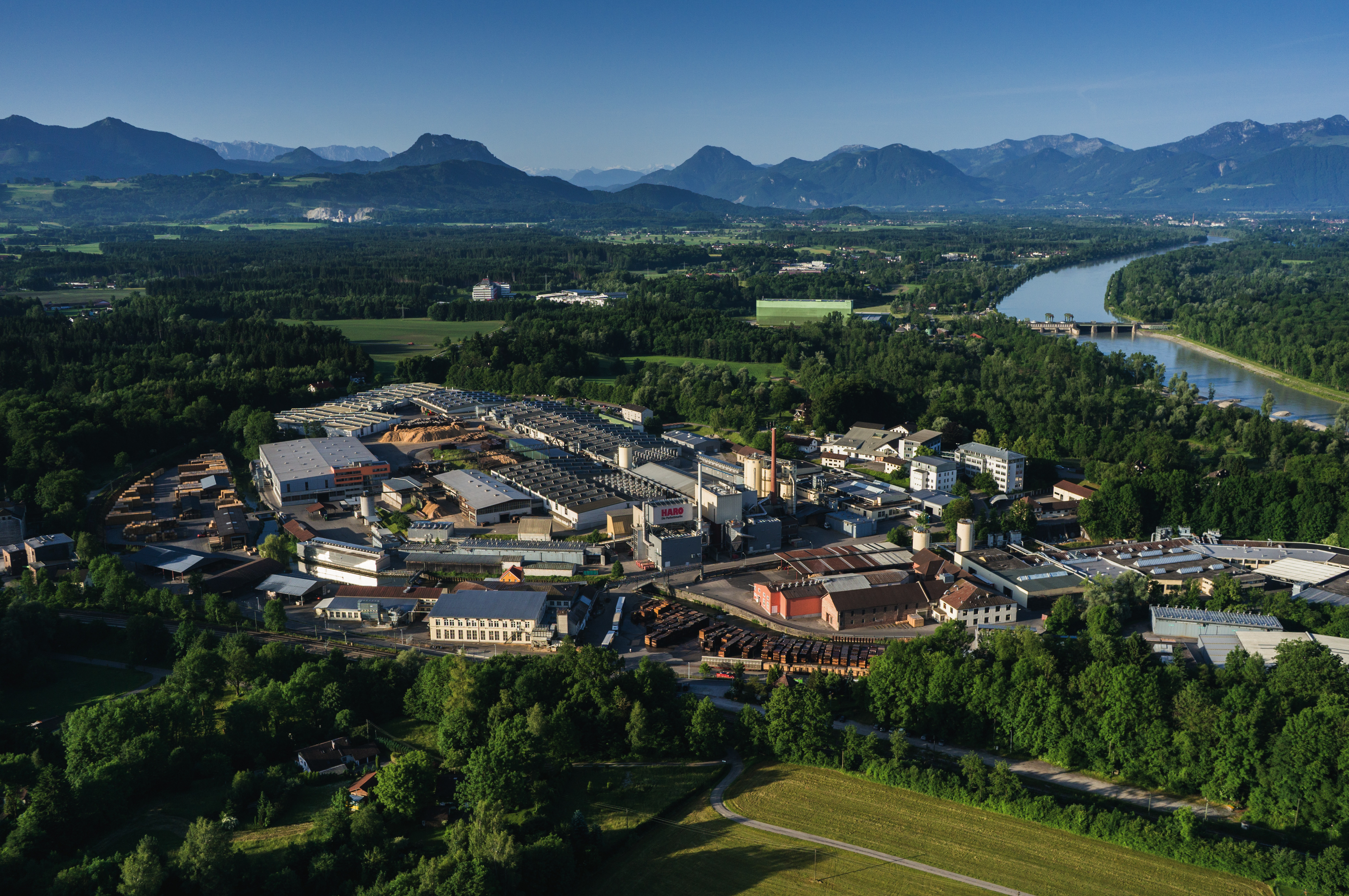 Das Firmengelände der Hamberger Flooring GmbH & Co. KG in Stephanskirchen aus der Vogelperspetive.